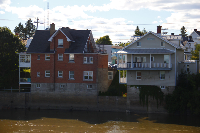 Maisons sur la rivière Sainte-Anne.